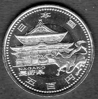 地方自治法施行60周記念貨幣の500円記念貨幣のうち、長野県のデザイン。善光寺と牛が題材になっている